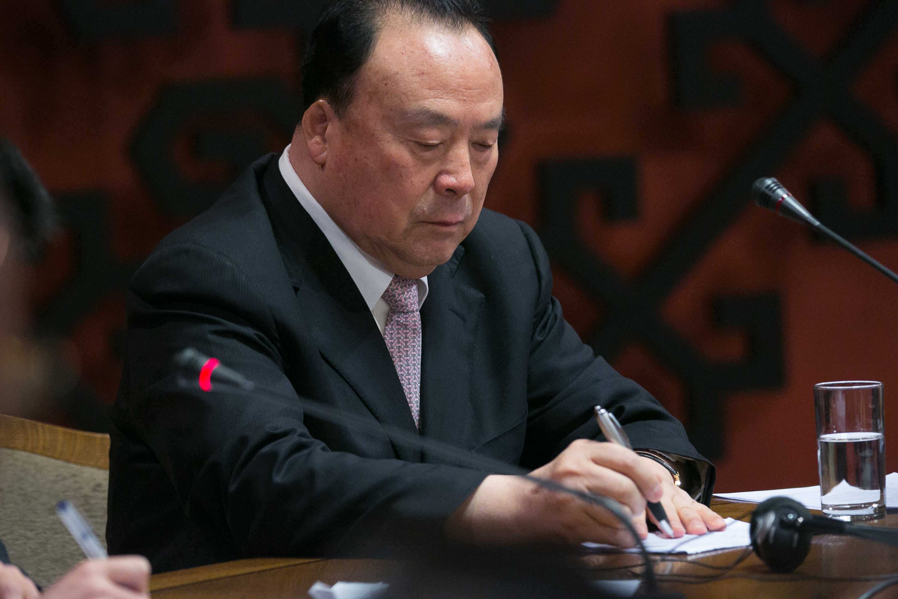 2012.gada 19.decembris. Andrejs Klementjevs tiekas ar Ķīnas Nacionālās komitejas priekšsēdētāja vietnieku Bai Ličenu.